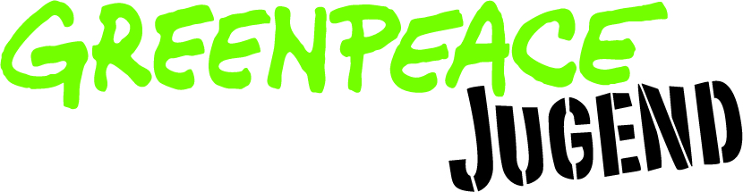 Logo der Greepeace Jugend